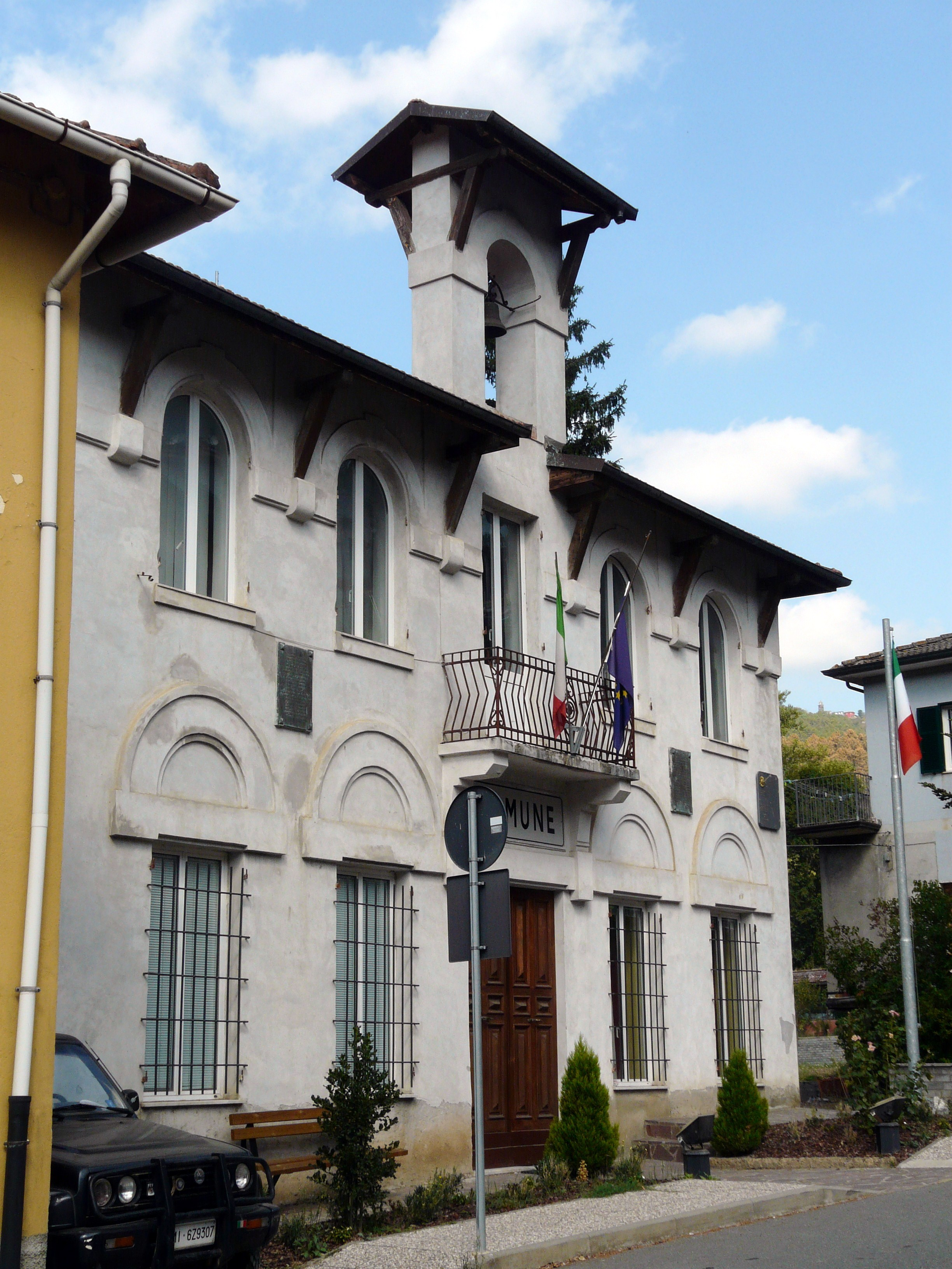 Municipio di Rocchetta di Vara, Liguria, Italia